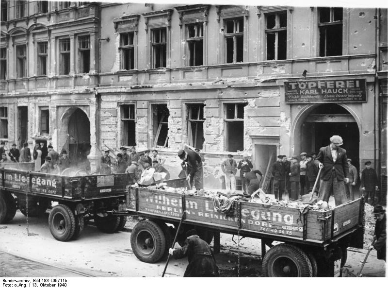 Scherl Hoheitsträger der Partei helfen Bombenschäden beseitigen Abtransport von Schutt Phot Wah 13.10.1940 8799-40